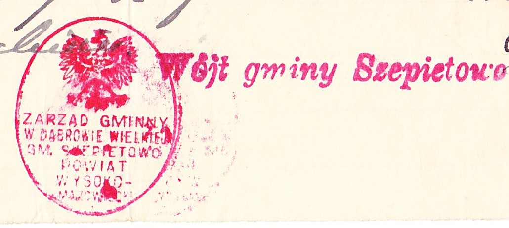 Jest to pieczęć z zaświadczenia wydanego przez wójta gminy Szepietowo Józefa Zarembę z dnia 1 marca 1939 r. Po przeniesieniu siedziby gminy do Szepietowa, budynek po byłym urzędzie po modernizacji przekazano szkole podstawowej w Dąbrowie Wielkiej.